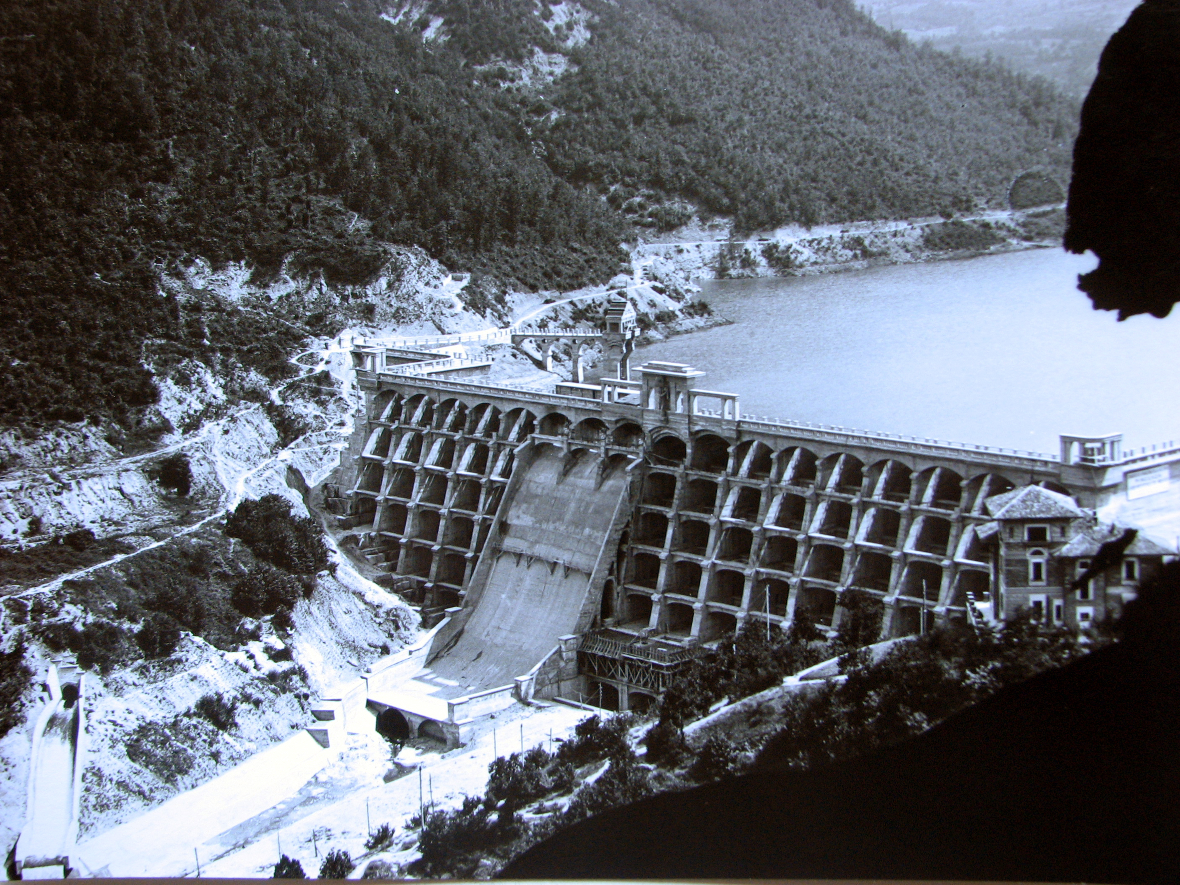 La diga del Molato venne commissionata e costruita tra il 1921 e il 1928 dal Consorzio bonifica della Val Tidone (AS Piacenza, Associazione degli industriali di Piacenza)